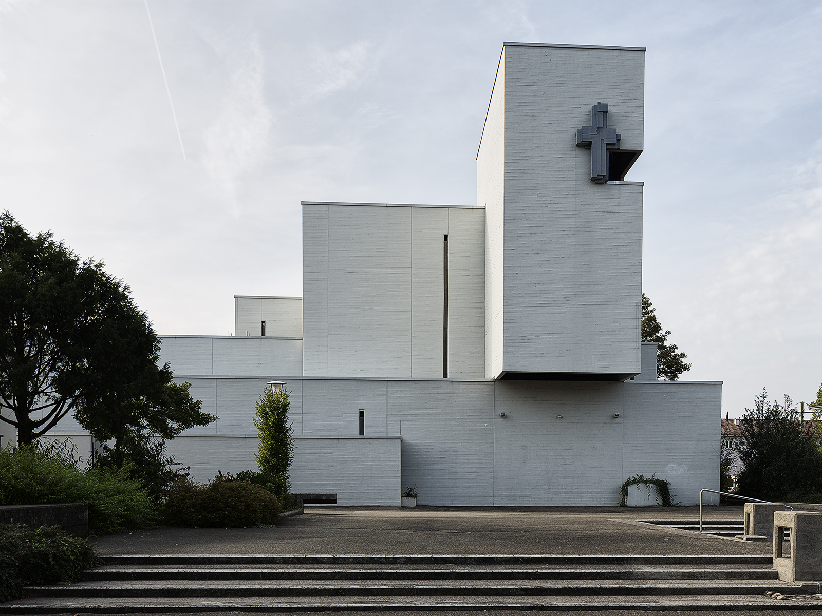 Römisch-katholische Pfarrei Johannes Maria Vianney, Muttenz, Basel-Landschaft